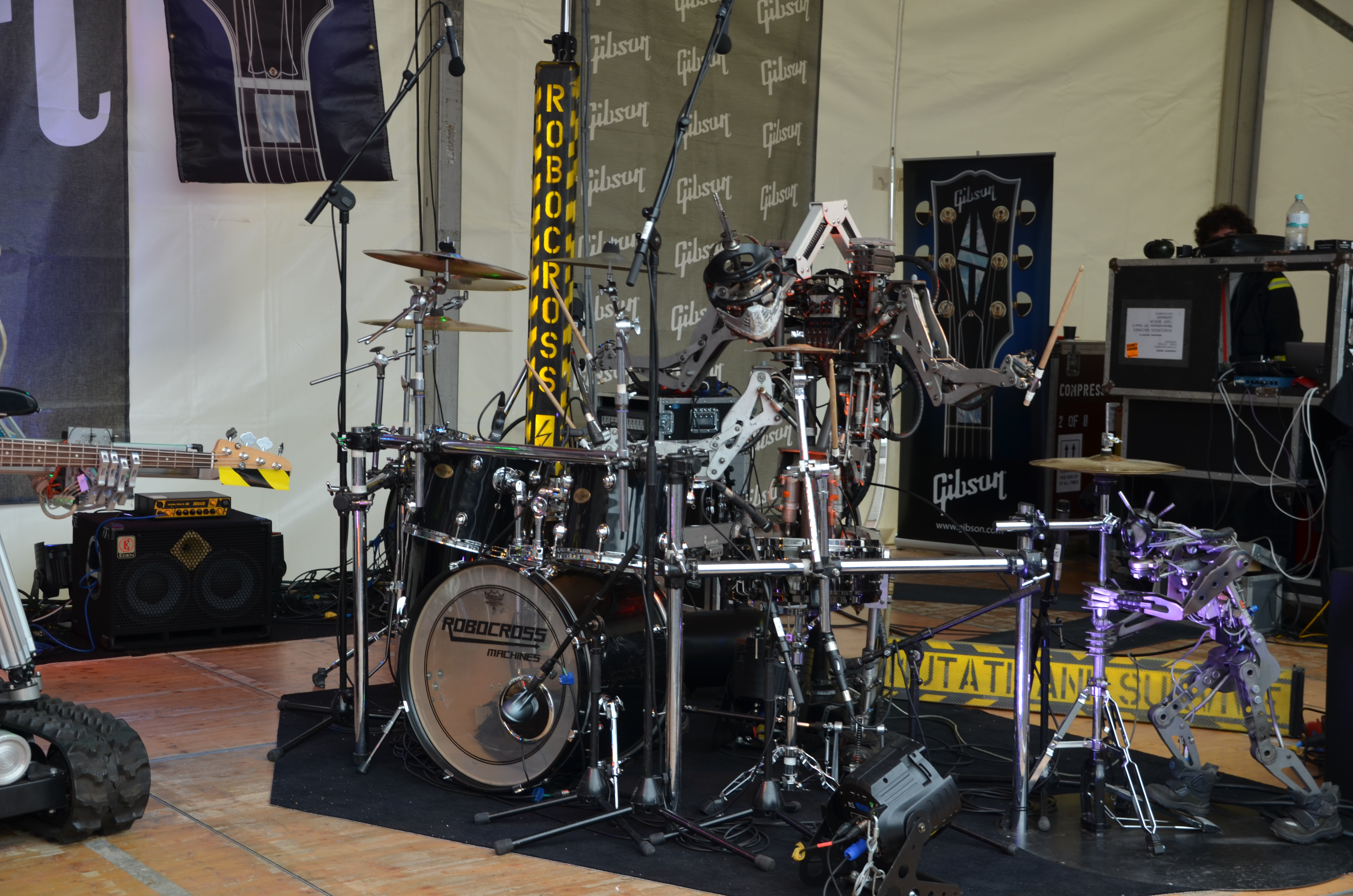 Musikmesse Frankfurt